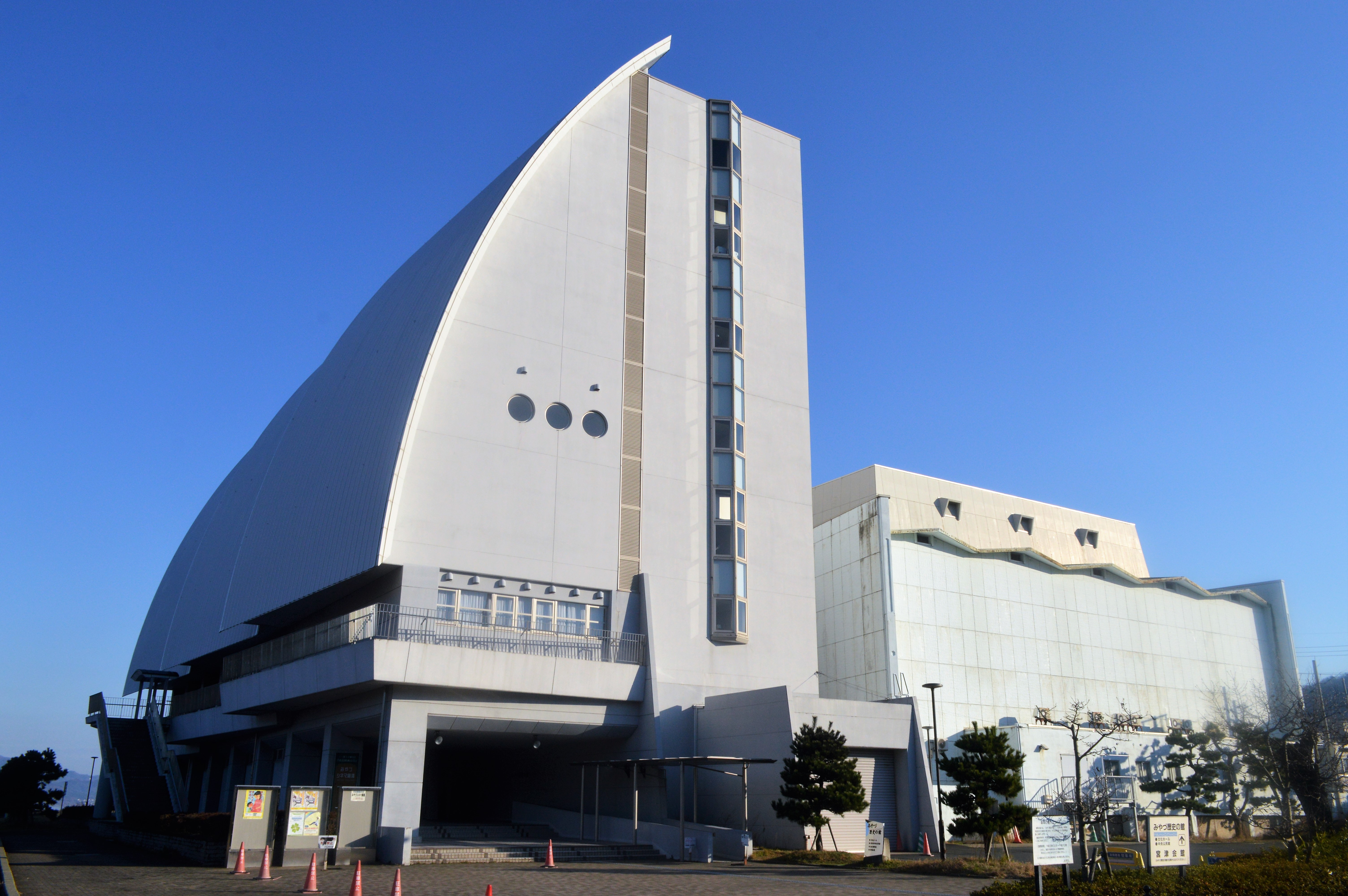 京都府宮津市にある宮津市みやづ歴史の館（左側の背の高い建物）と宮津会館（右側の背の低い建物）。宮津会館は1967年12月に完成。